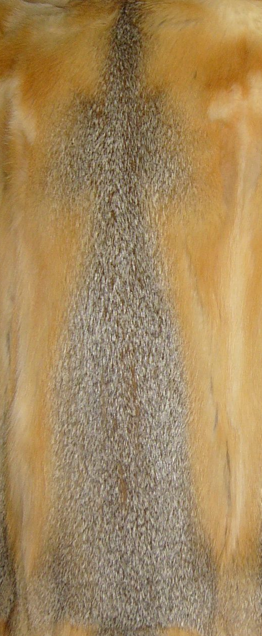 Swiftfuchsmantel (Ausschnitt).